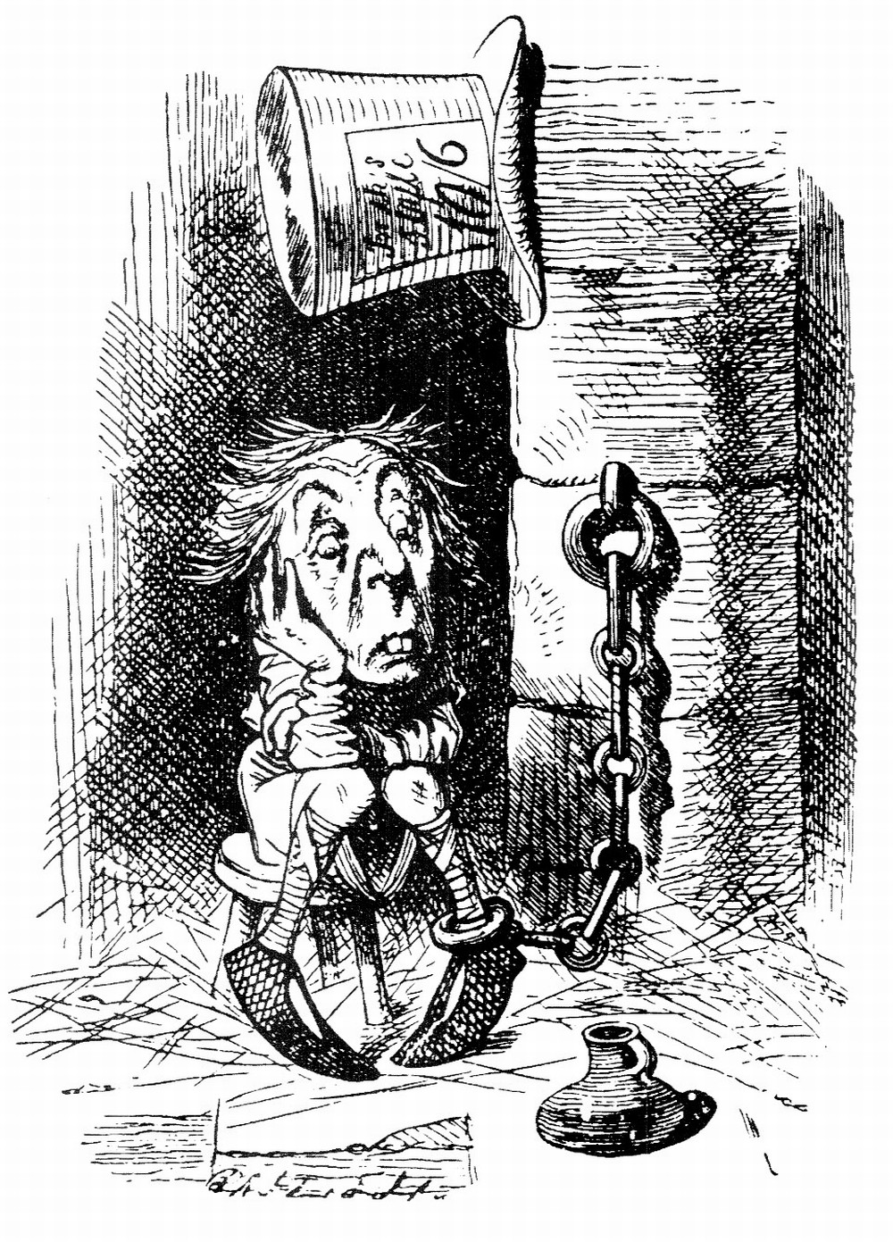 гравюра Джона Тенниела